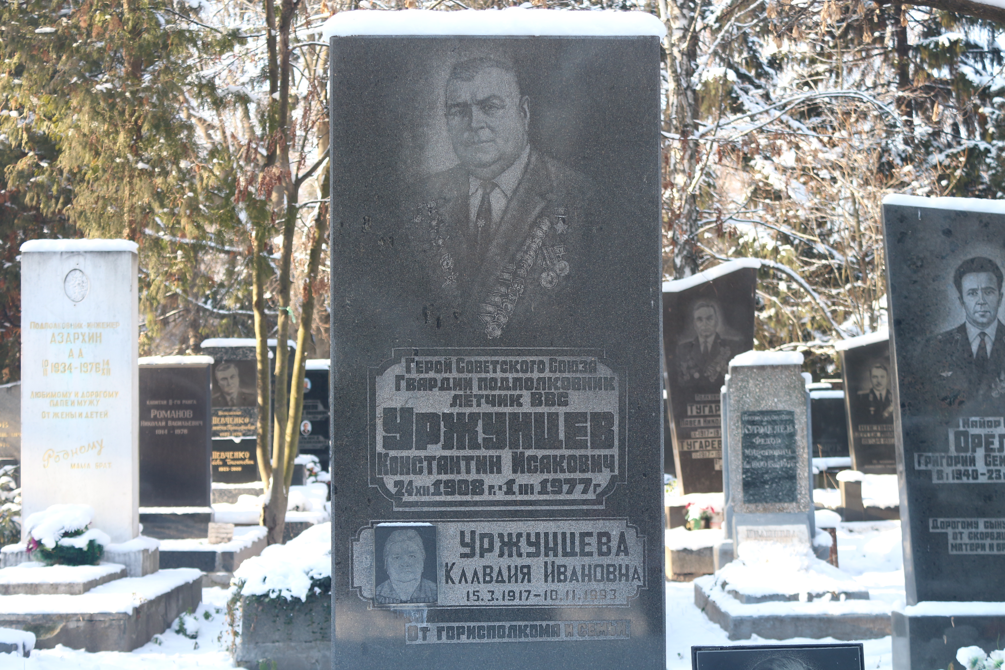 Уржунцев Константин, Лукьяновское военное кладбище